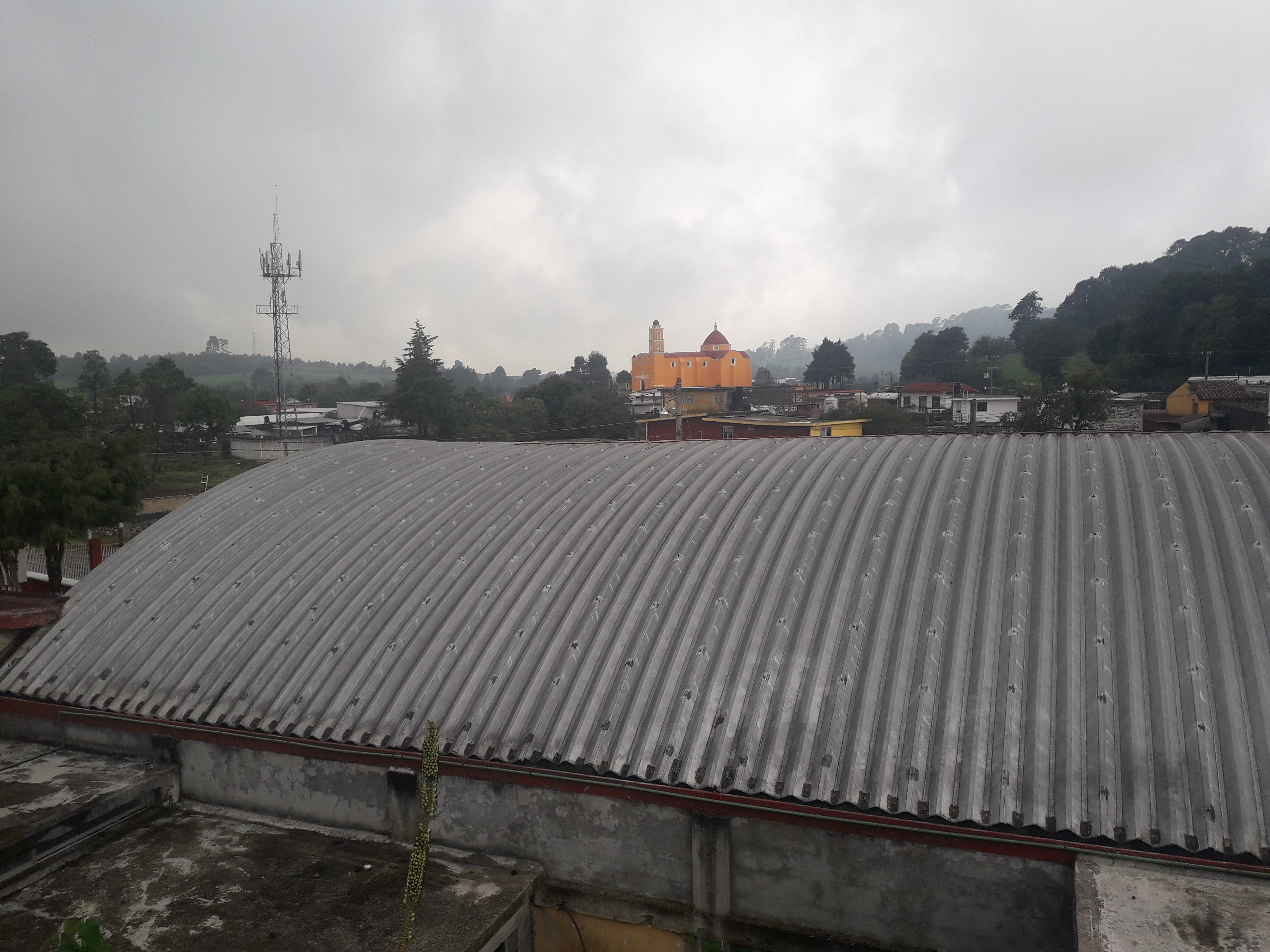 Tomada en el salon social